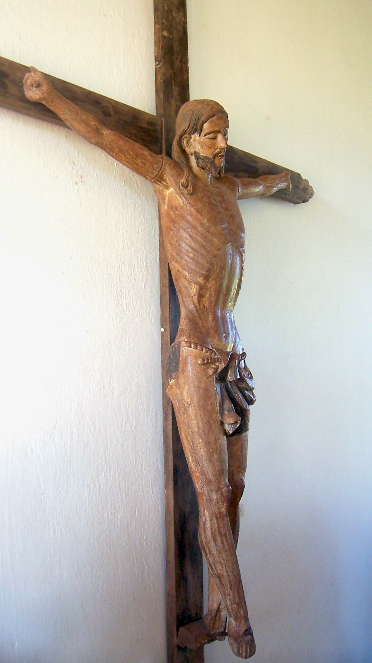 Crucifixo missioneiro